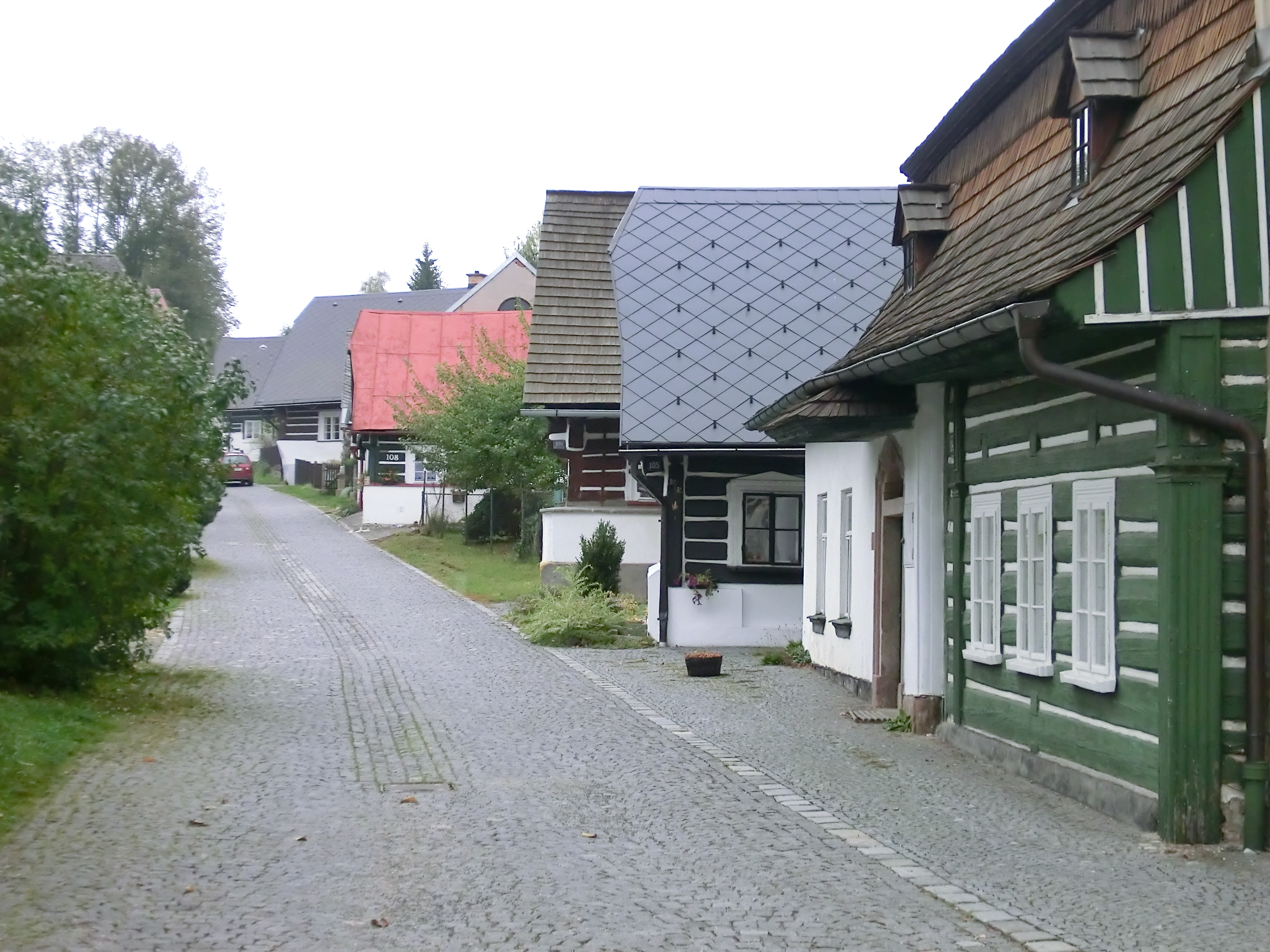 Zvědavá ulička v Jilemnici - okenní osy jsou posunuté tak, aby bylo vidět do centra města.